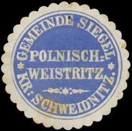 Sealing stamp Title: Gemeinde Siegel Polnisch Weistritz Kreis Schweidnitz Description: blau, weiß, geprägt Place: Weistritz size: 4 cm